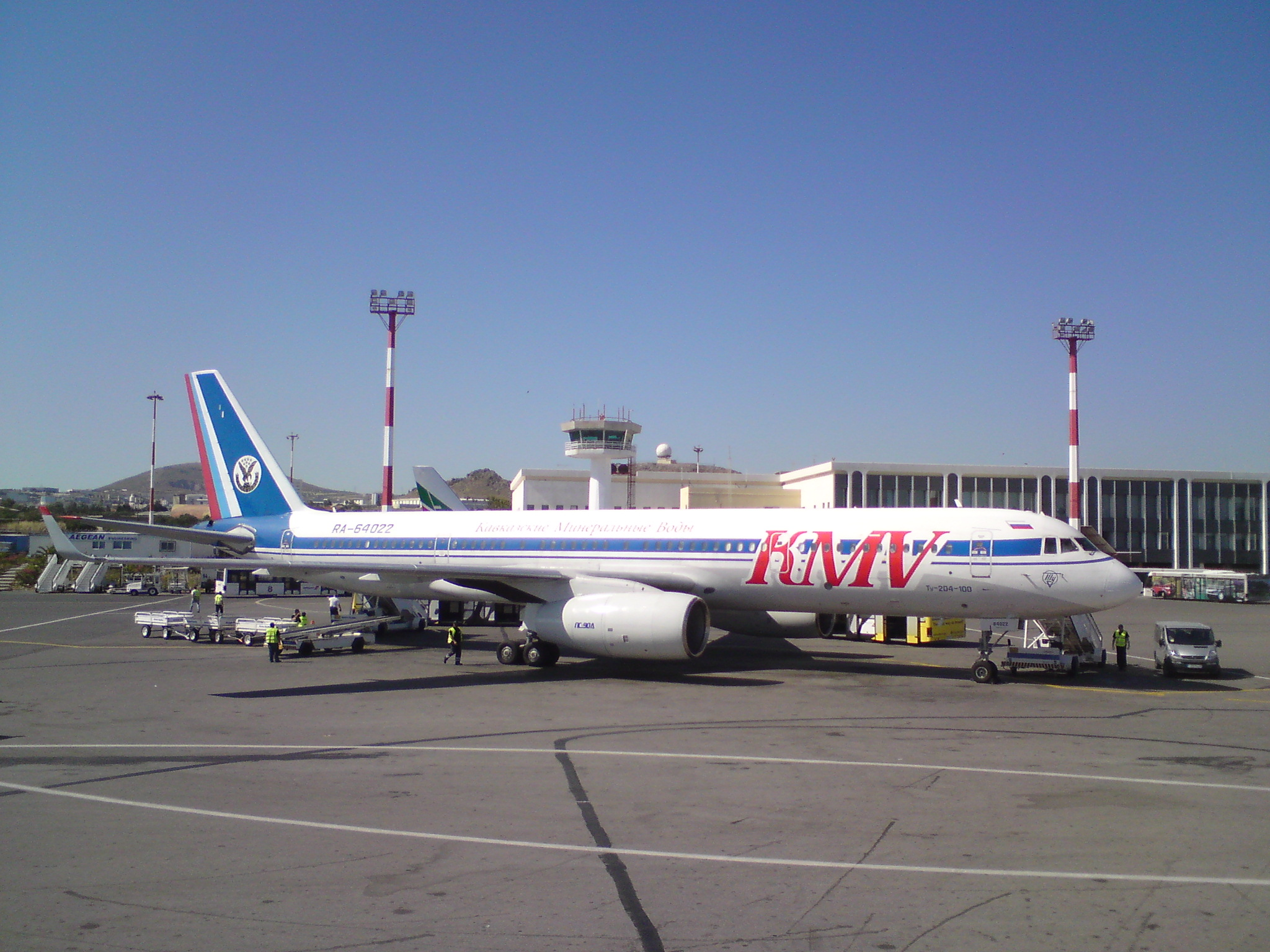 Eine der beiden Tu 204-100 der KMV, hier gerade nach Erreichen der Parkposition auf dem Flughafen von Heraklion (Kreta, Griechenland) am 07. Juni 2009.